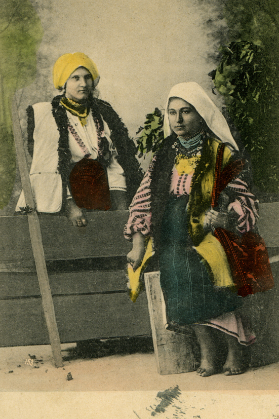 Дореволюционная открытка Российской империи из серии «Малороссийские типы».